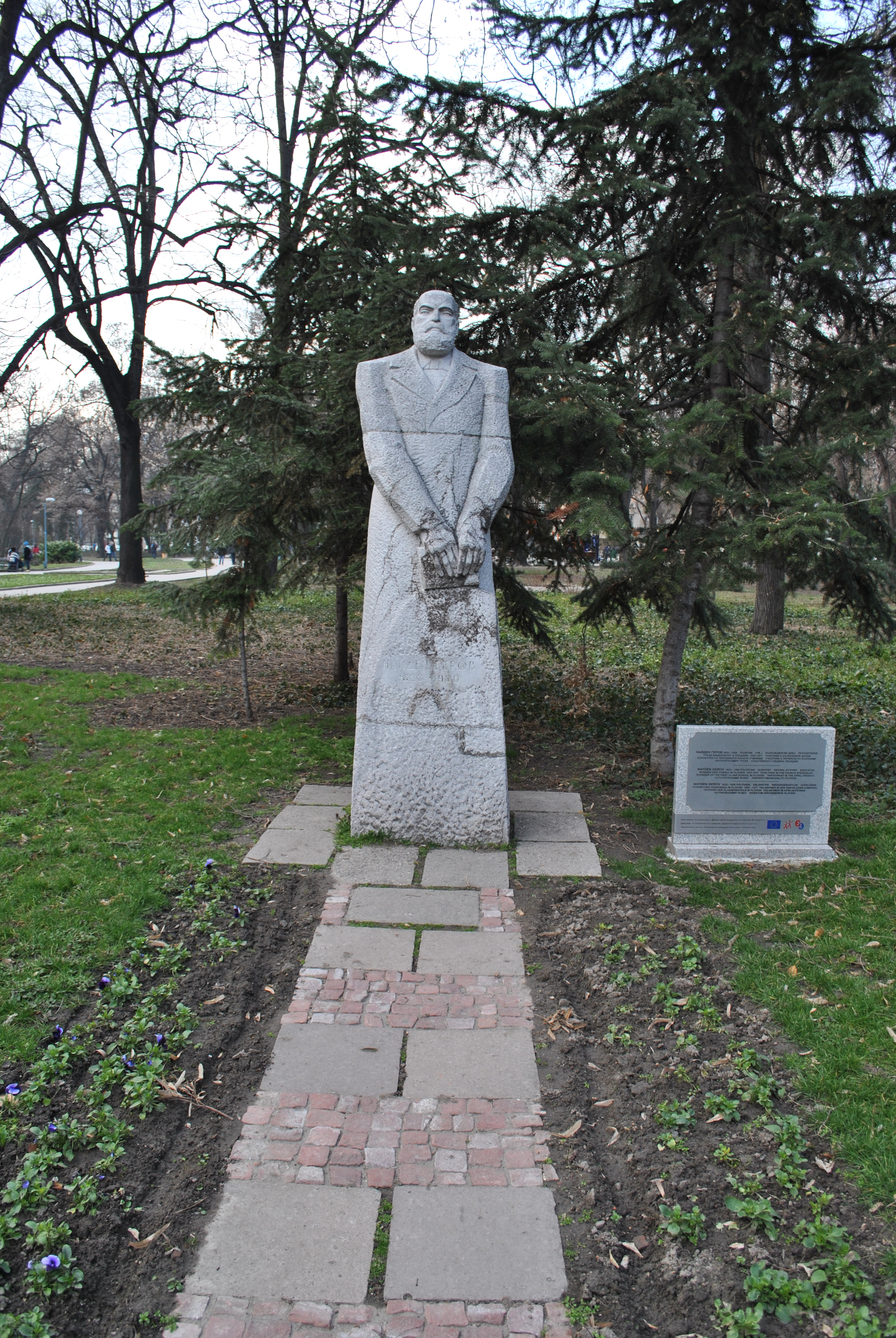 Паметник на Найден Геров в Цар Симеоновата Градина, Пловдив, България